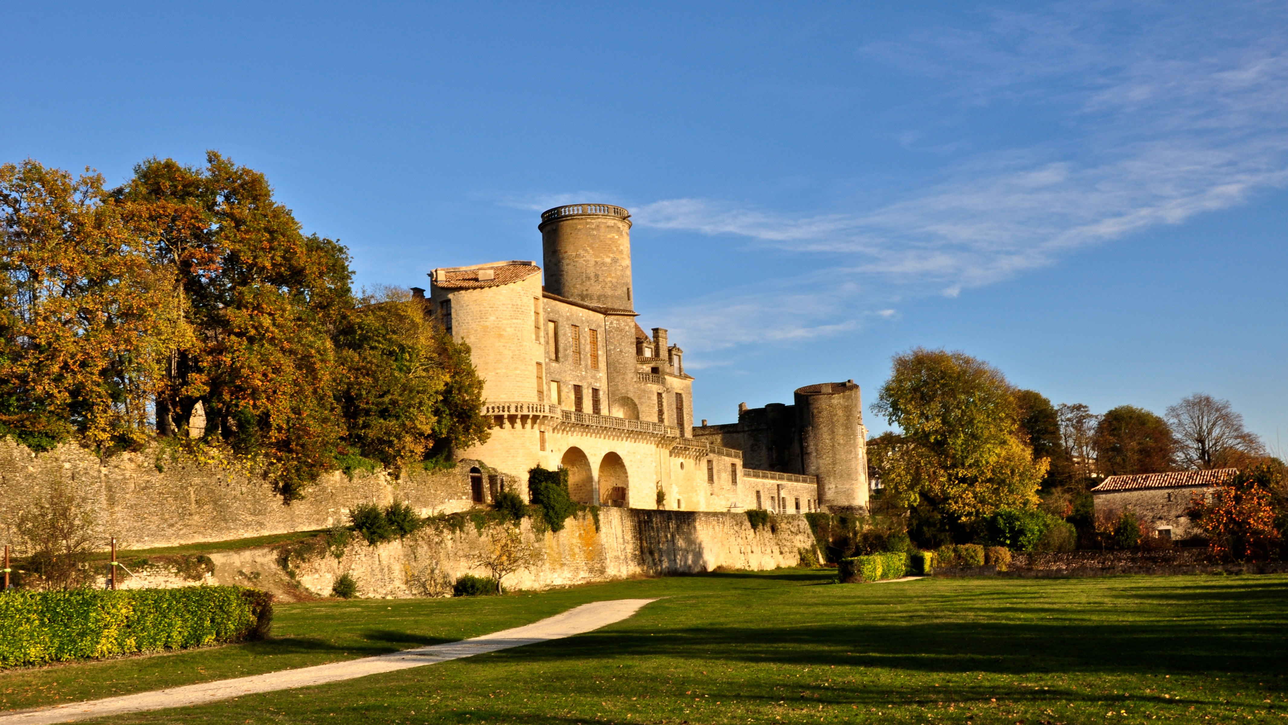 Le château de Duras